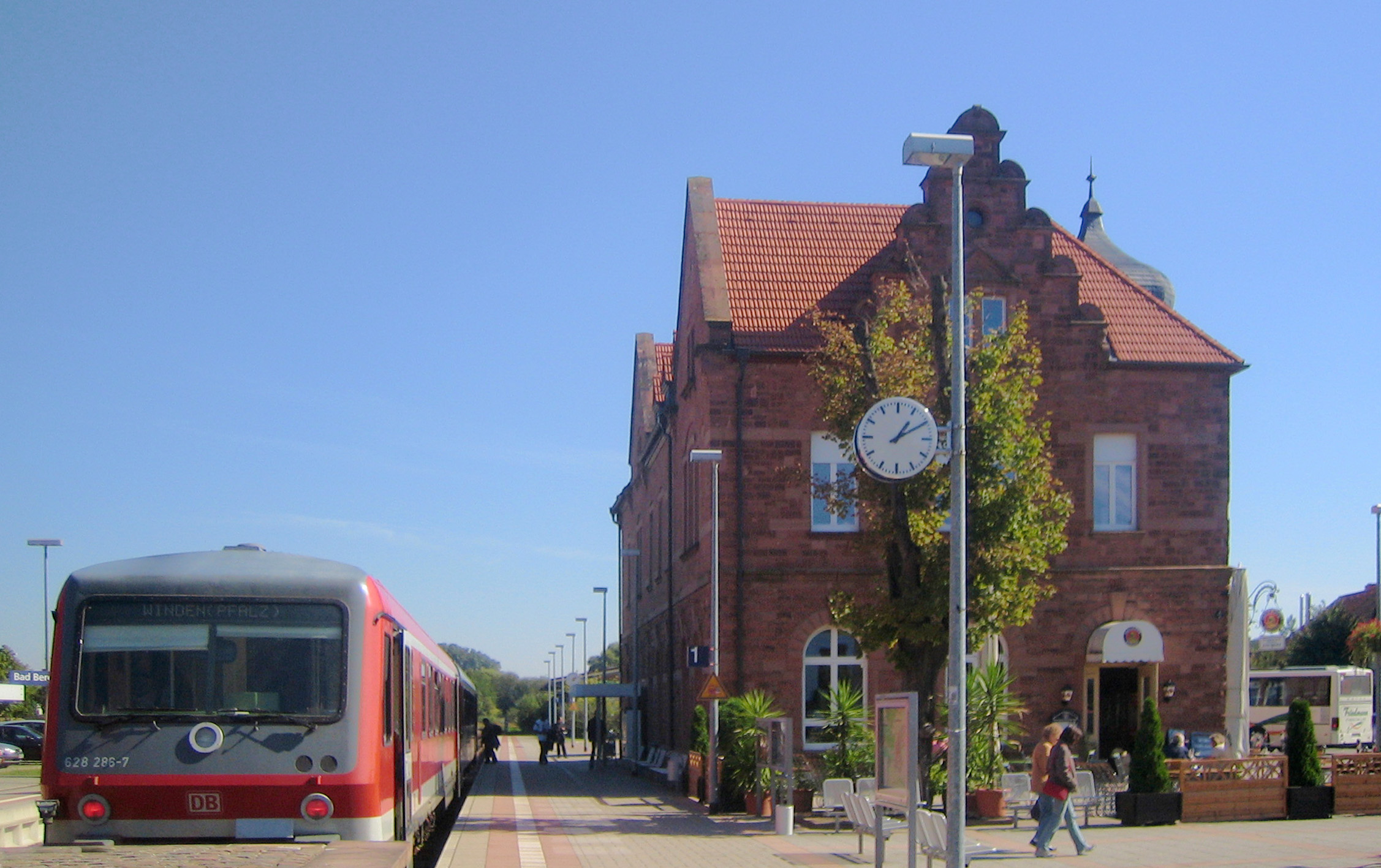 Zug im Bahnhof Bad Bergzabern.